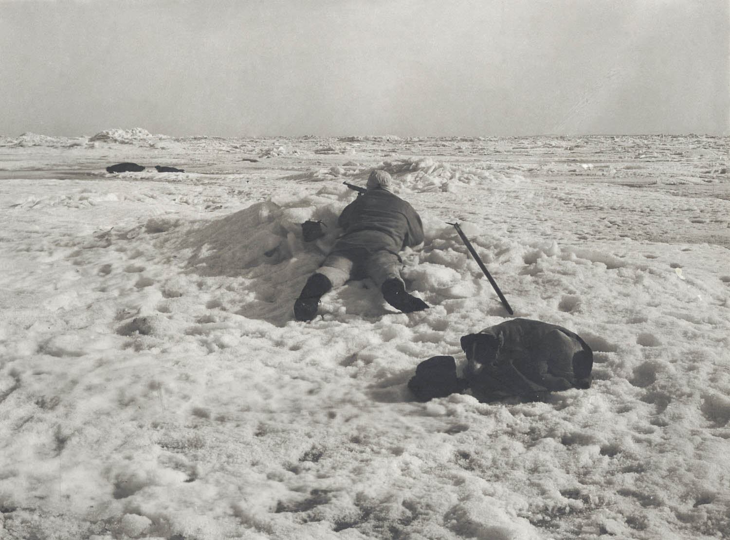 Säljakt, liggande jägare på isen